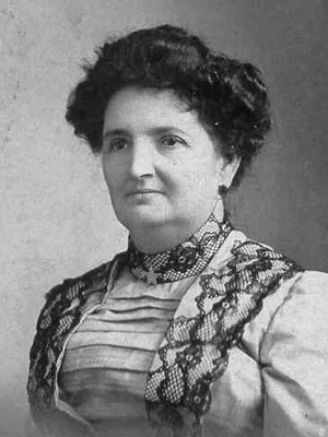 Candelaria (Candello) Figueredo y Vazquez